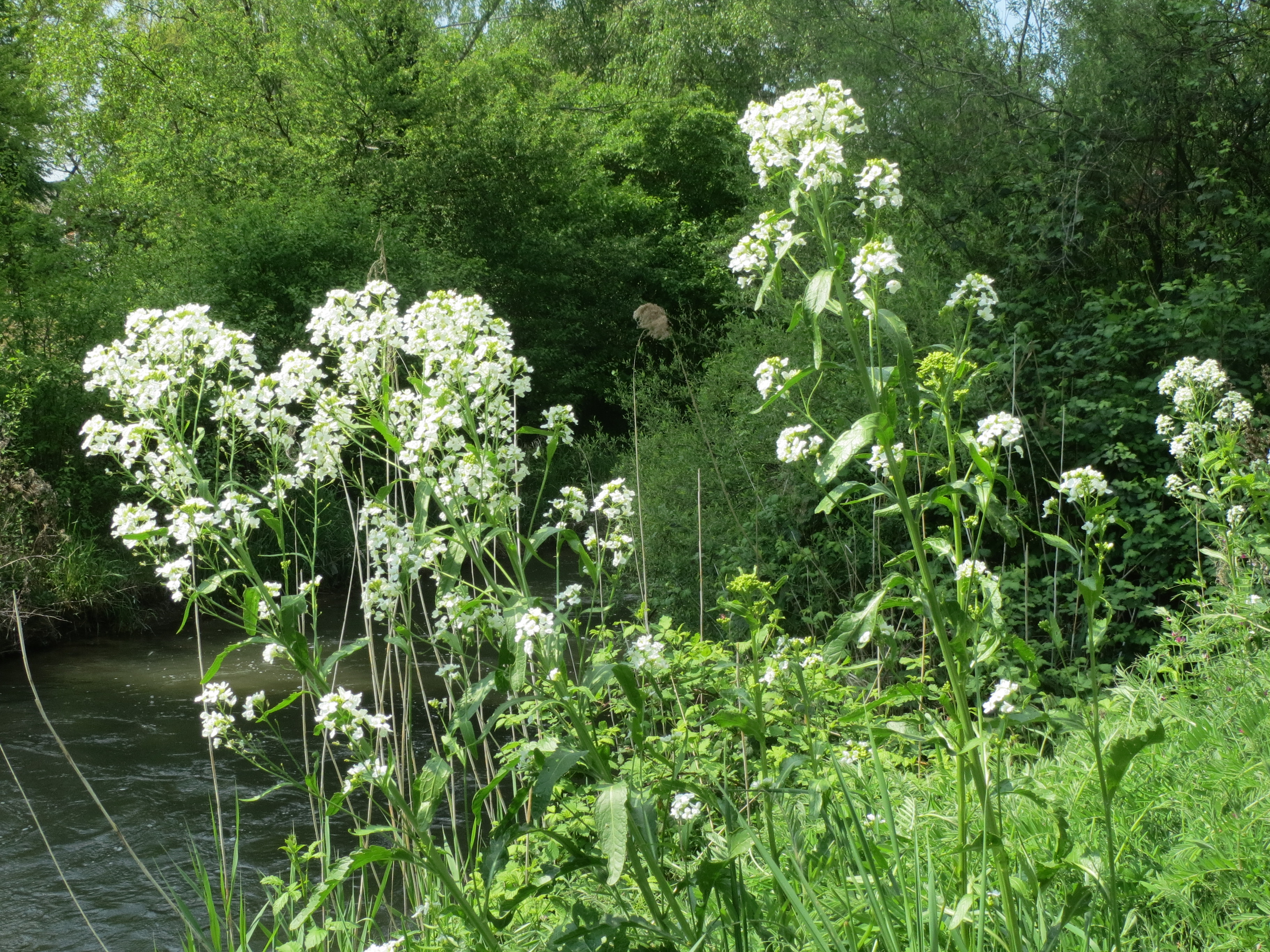 Meerrettich (Armoracia rusticana) am Kraichbach in Hockenheim